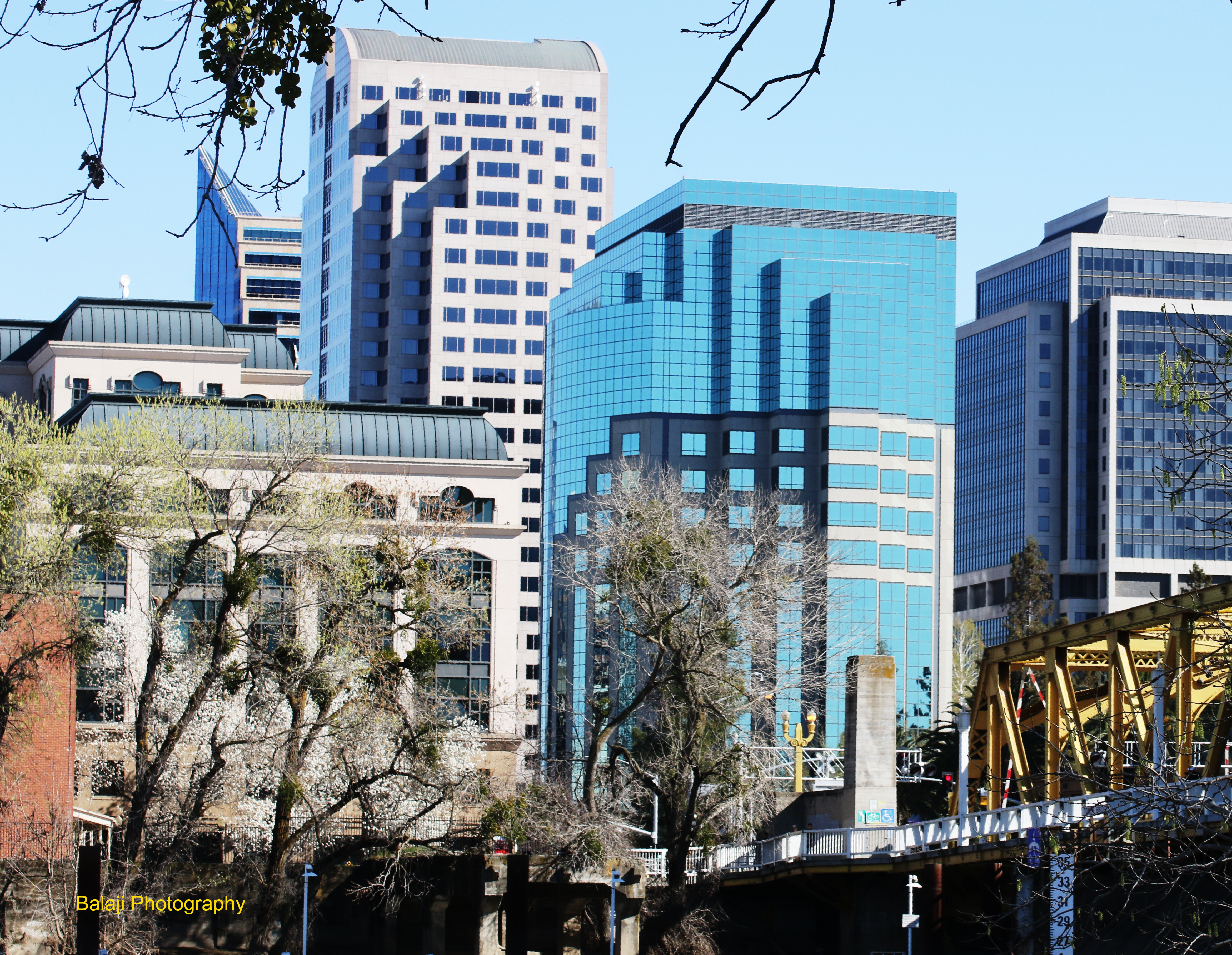 Sacramento , California